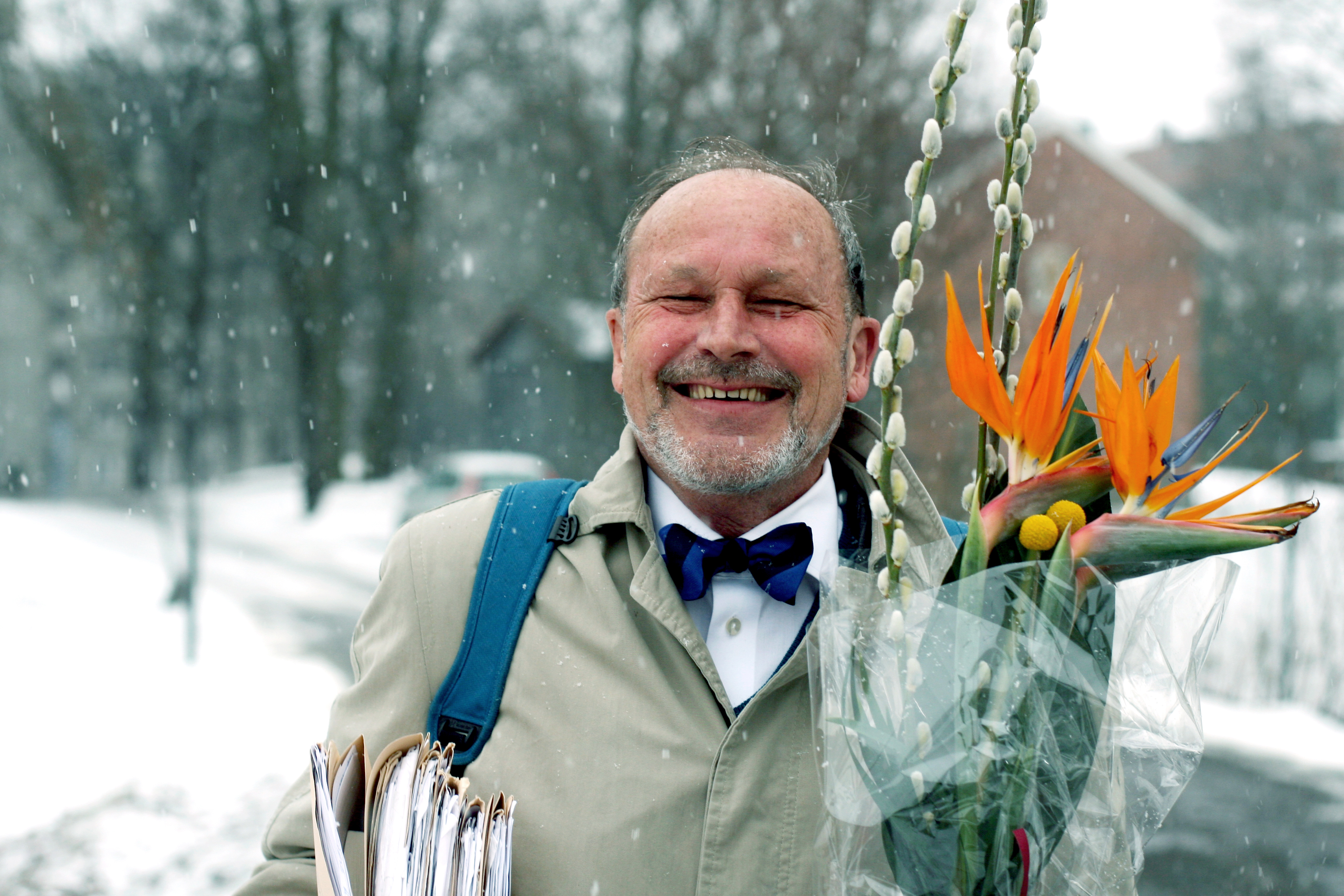 Per Fugelli ved Ullevål Sykehus med blomsterbukett. Bruk gjerne bildet, så lenge du krediterer meg. / Feel free to use, but please credit me.